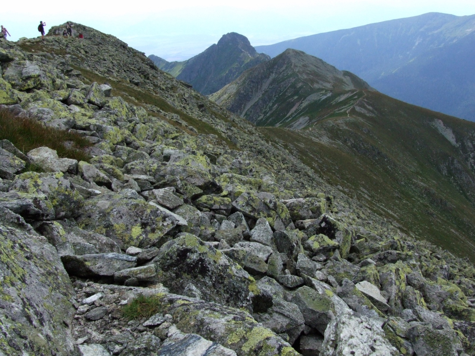 Otargańce (Tatry Zachodnie). Od lewej: Raczkowa Czuba, Wyżnia Magura, Pośrednia Magura, Niżnia Magura